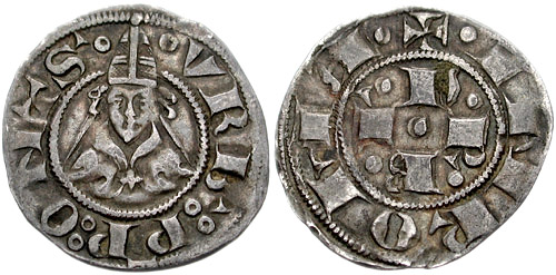 Italia, Stato Pontificio. Urbano V. 1362-1370. AR Bolognino (20mm, 1.11 g, 6h). VRB': P(I orizzontale)P: QNTS., busto di fronte con mitra +IN ROMA, croce formata dalle lettere •U•R•B•I• intorno ad un cerchio centrale. see Italian medieval coins Italy, Papal States. Urbanus V. 1362-1370. AR Bolognino (20mm, 1.11 g, 6h). VRB': P(horizontal I)P: QNTS., mitred bust facing +IN ROMA, •U•R•B•I• in cross form around central pellet. CNI XV pg. 183, 11; Muntoni I pg. 30, 3 var. (obv. legend); Berman 198 var. (same).